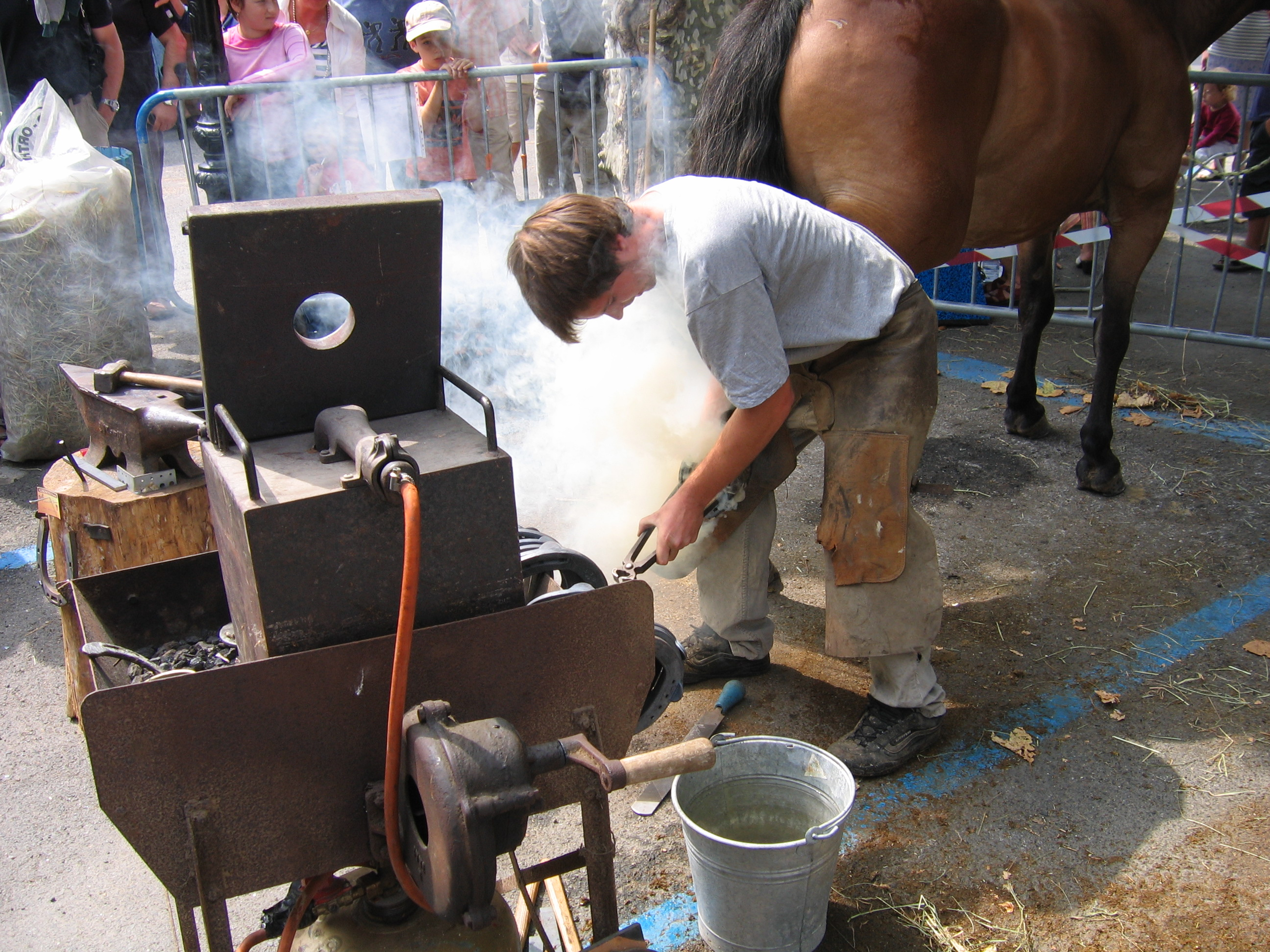 Nadat het hoefijzer verhit is, en in de juiste vorm is geslagen, wordt het gepast...